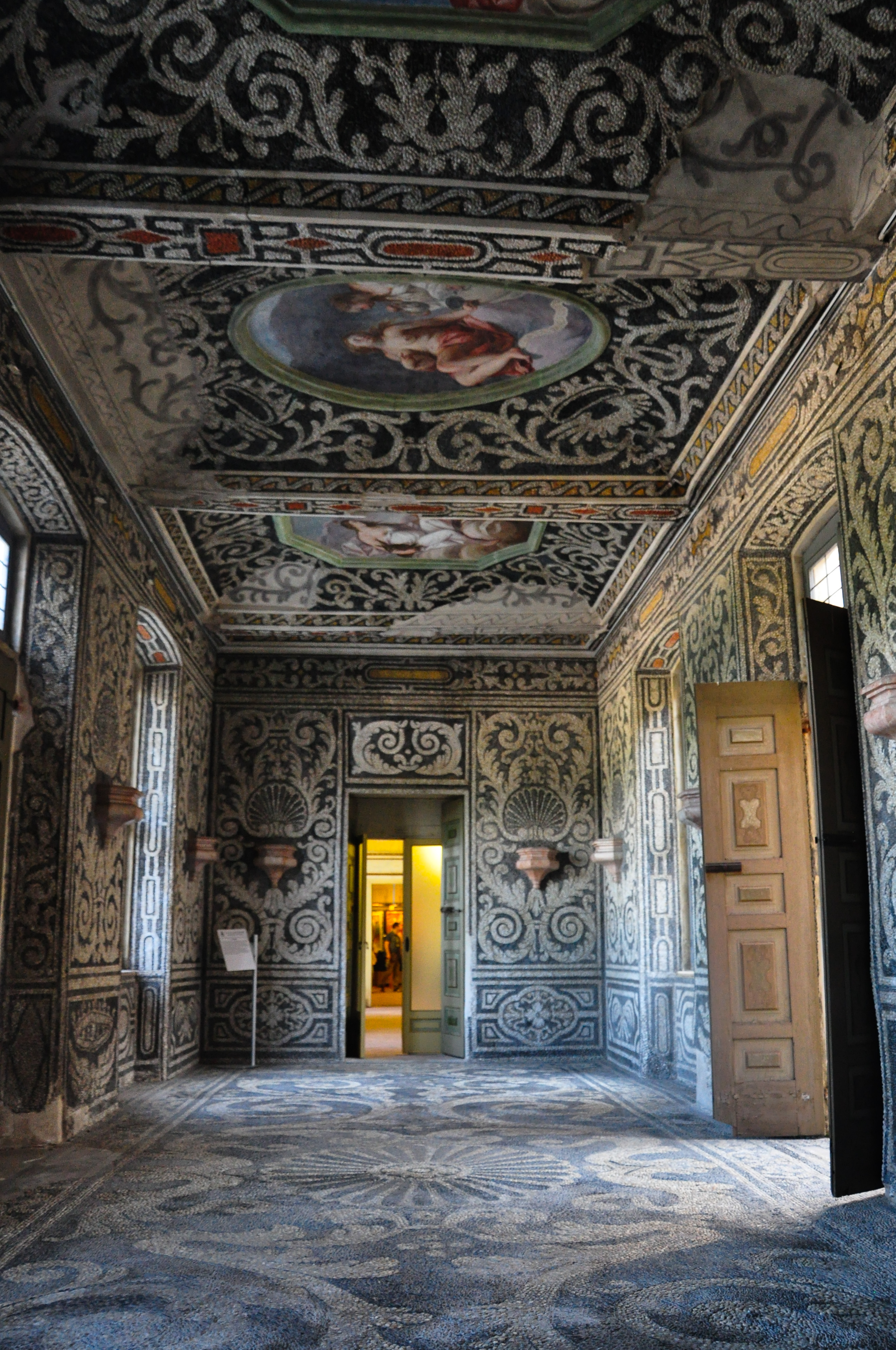 Sala del cielo palazzo Borromeo Arese piano terra sassi di fiume